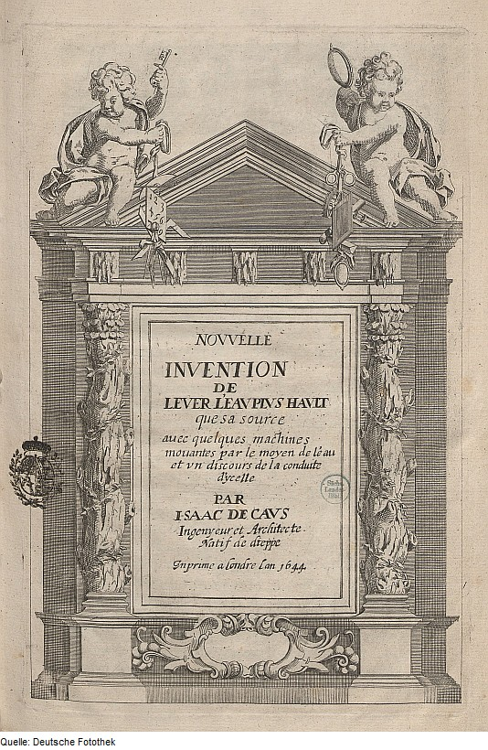 Original image description from the Deutsche FotothekArchitektur & Fenster & Putte